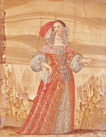 Béjart, Madeleine (1618–1671), actrice française dans le rôle de Magdelone (Molière «Les précieuses ridicules»)